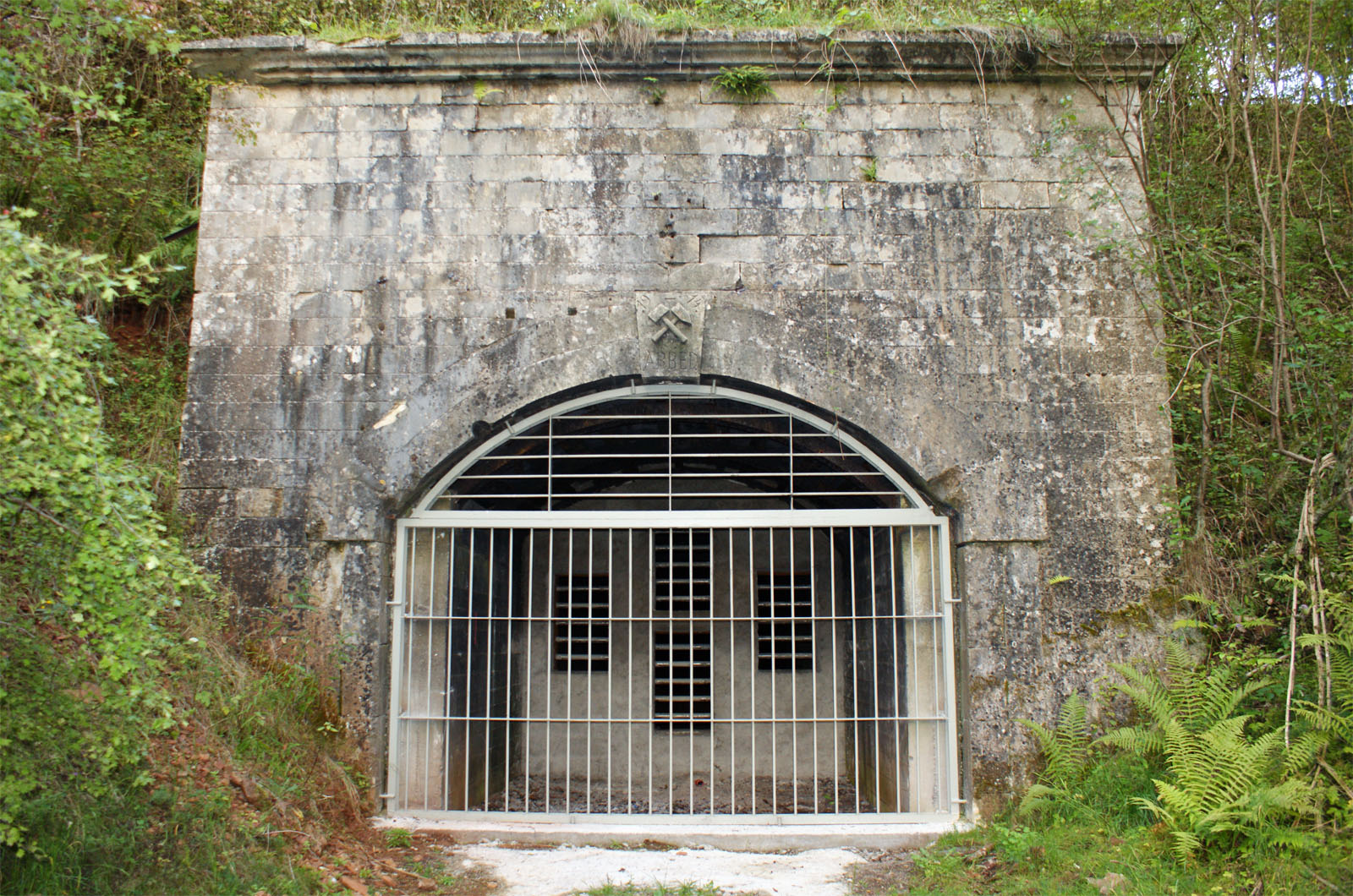 Agank vum Tunnel fir op Rëmeleng. Burbacher Lach, Esch-Uelzecht. September 2010